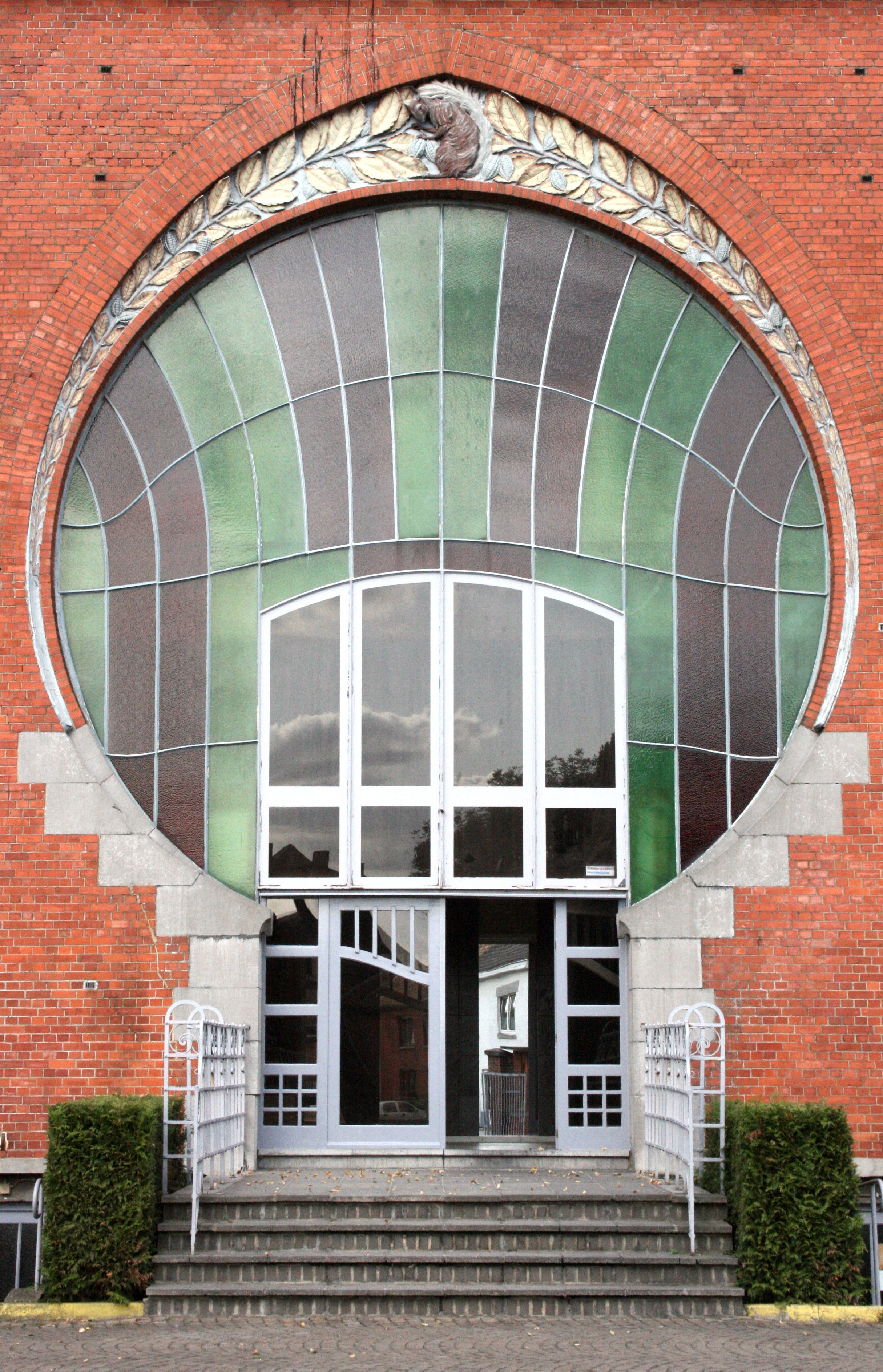 Nerem (Tongeren), provincie Limburg, België. Voormalige chocoladefabriek Rosmeulen (1904-1909). Architect : Clément Pirnay. Art Nouveau stijl